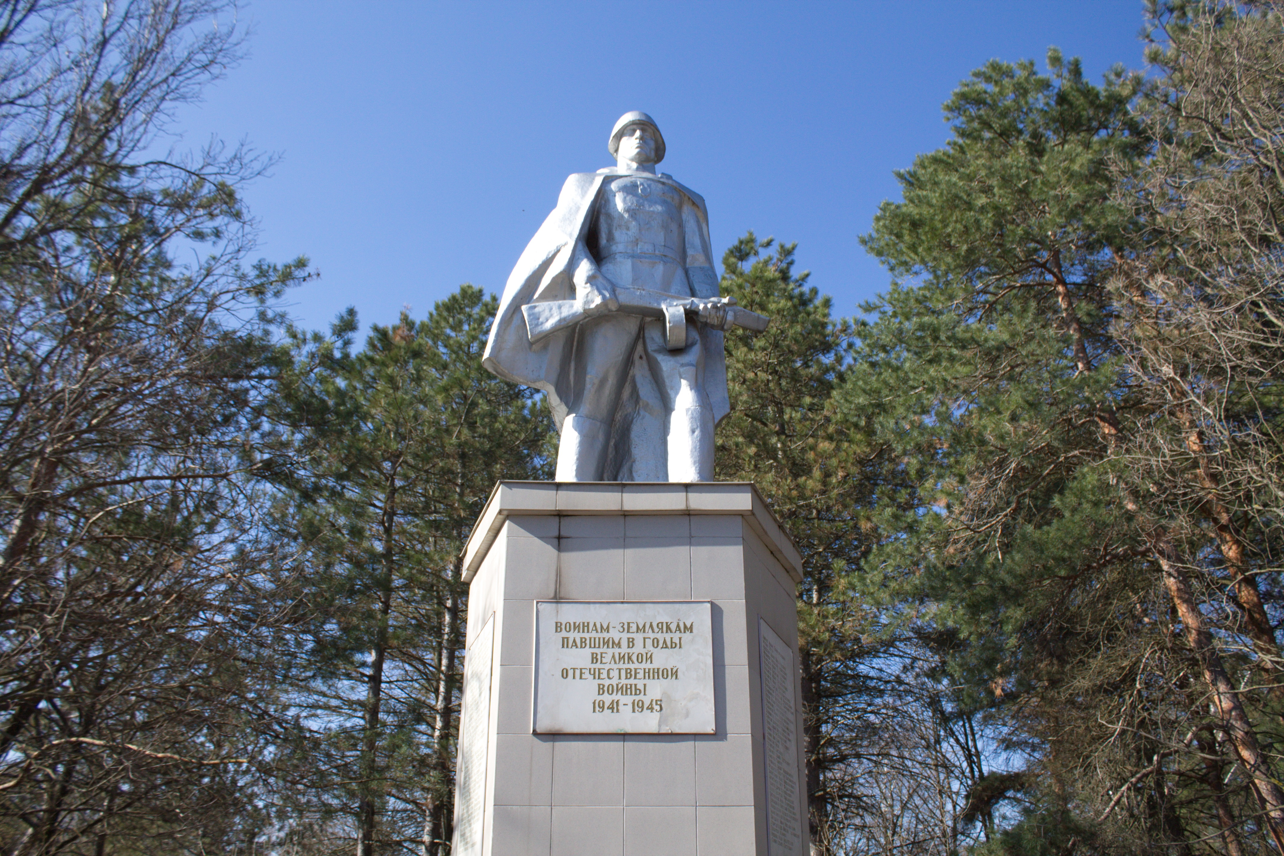 Мемориал воинам-землякам, павшим в годы Великой Отечественной войны